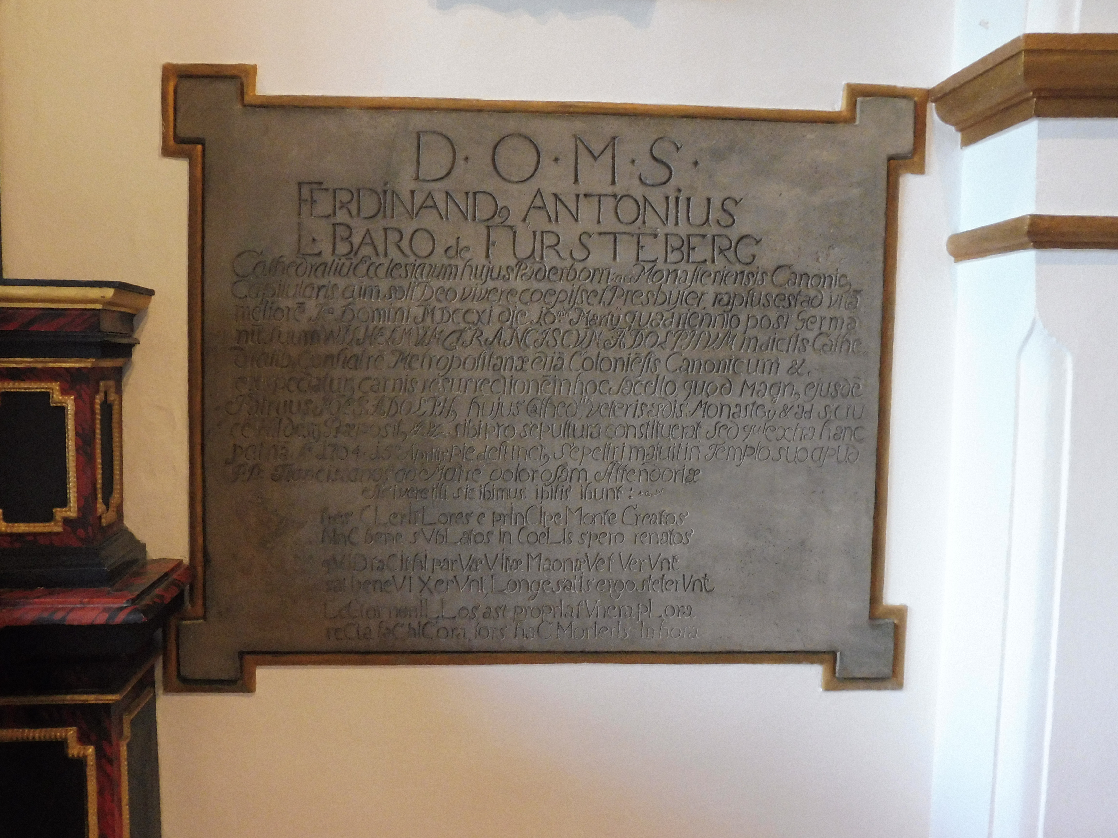 Inschrift mit Mehfachchronogramm (1711) in der Engelkapelle des Paderborner Doms